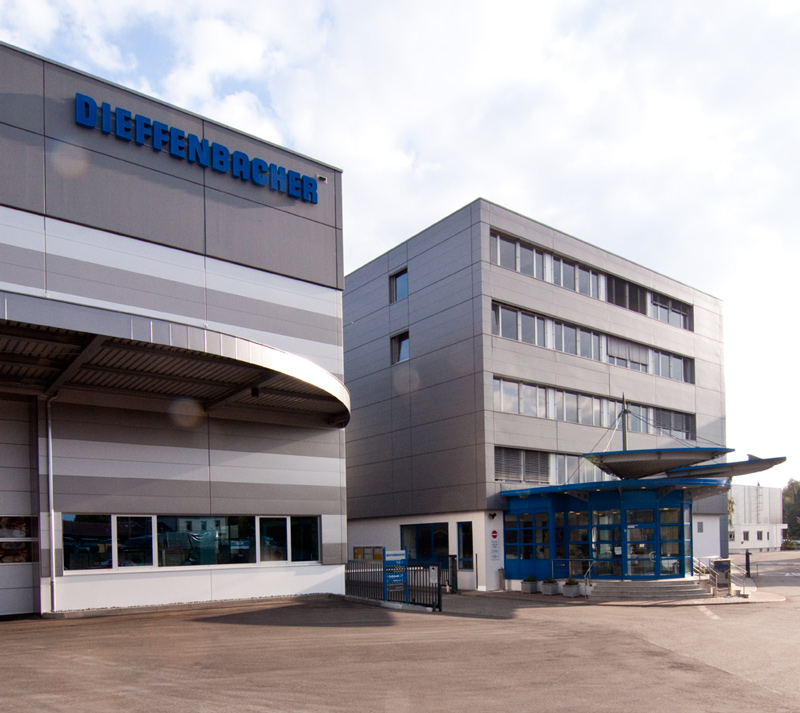 Dieffenbacher Gebäude